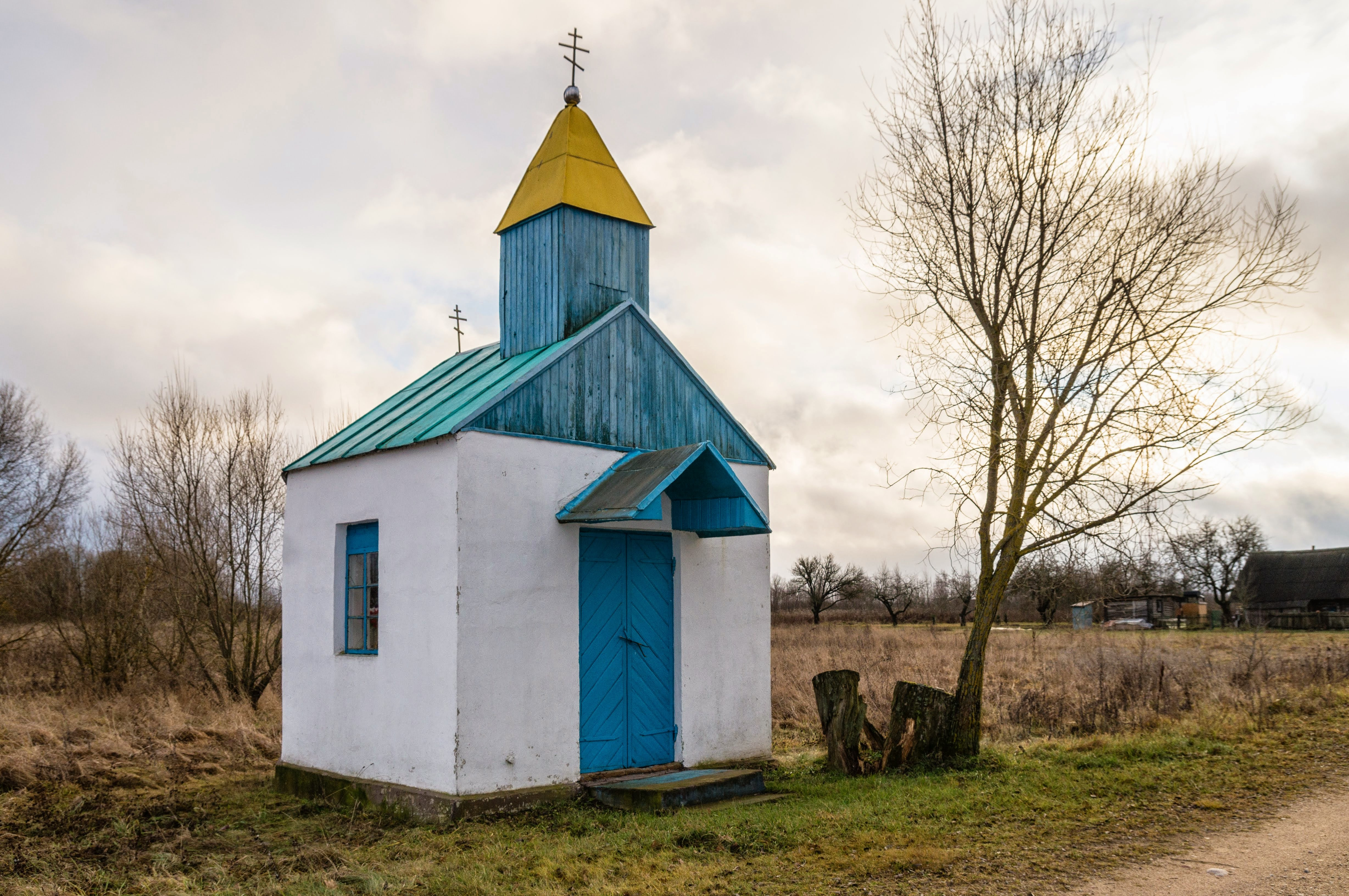 Капліца ў Поні